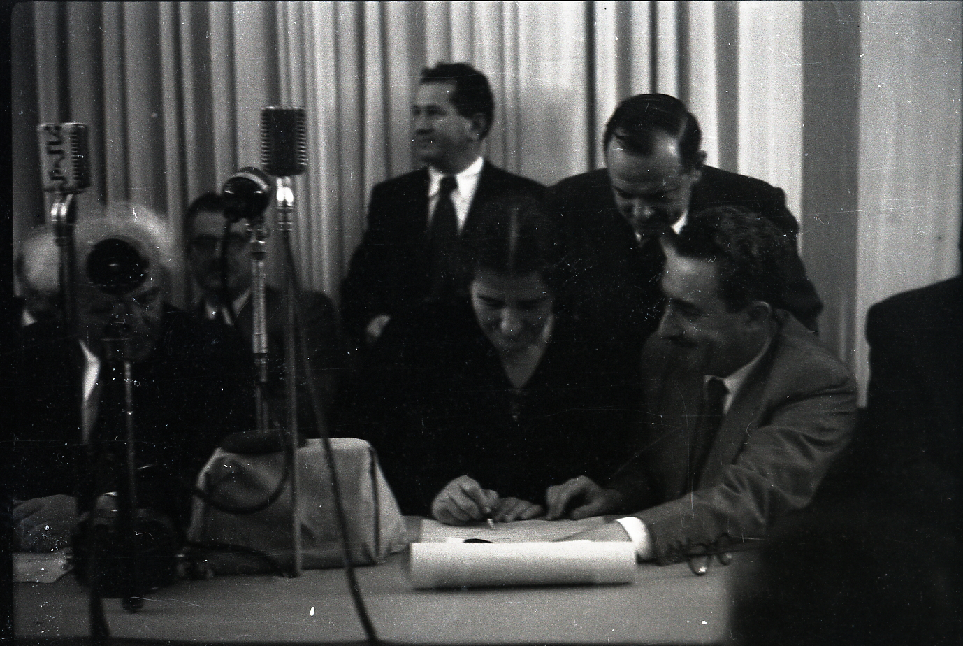 גולדה מאיר חותמת על מגילת העצמאות 1948